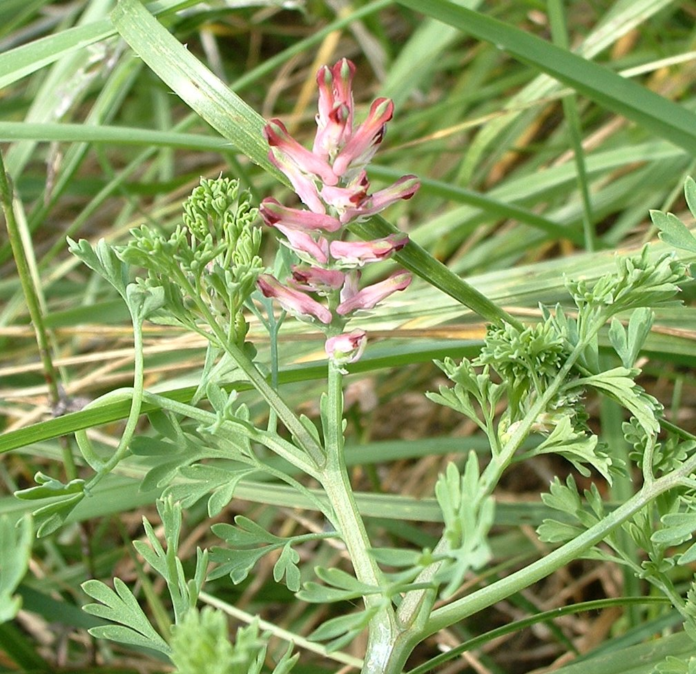 photo prise dans une pelouse. photo taken in grass